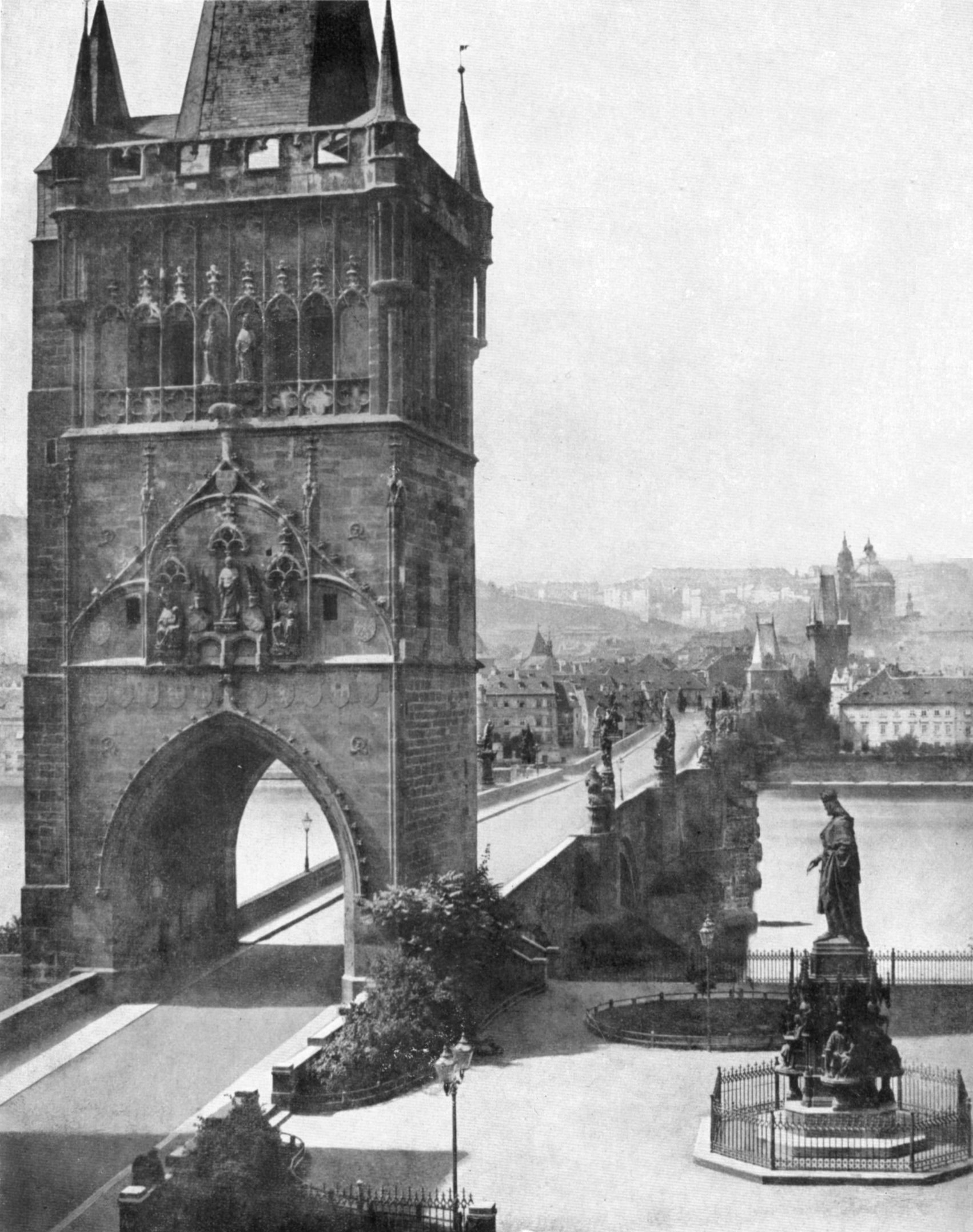 A. Groll - Staroměstská mostecká věž v Praze, 1856